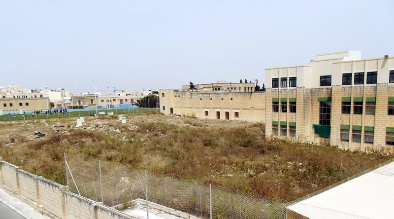 Zejtun Roman villa site